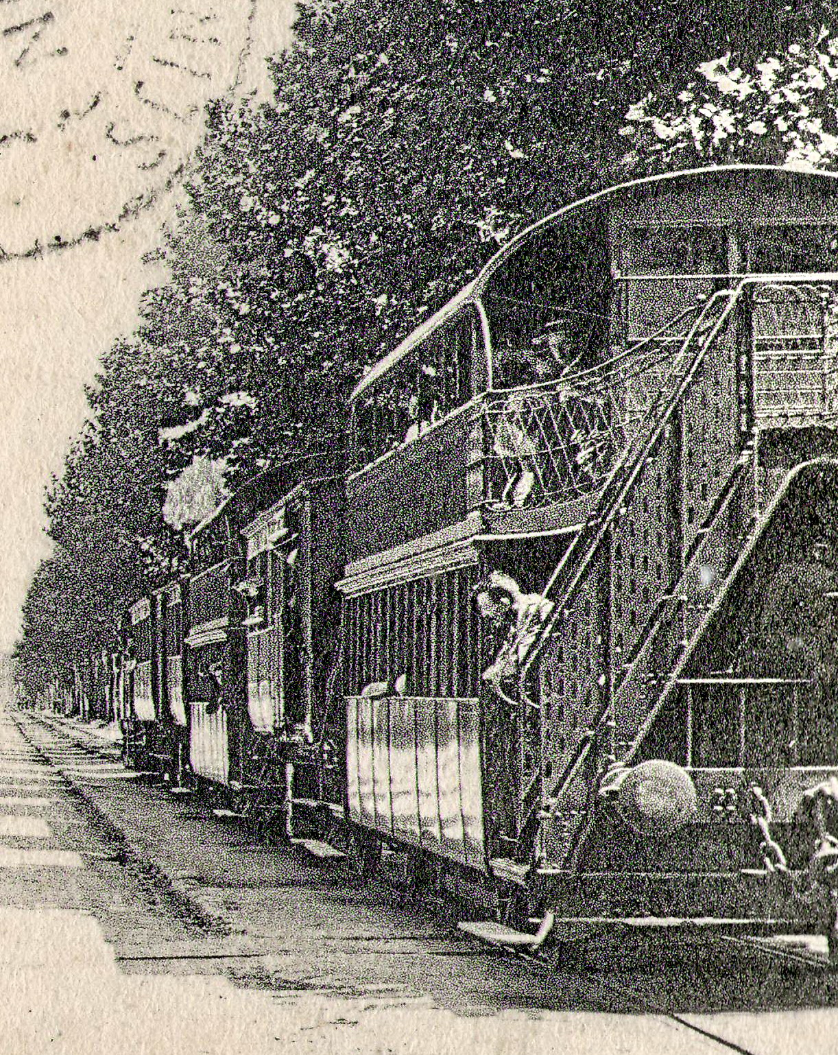 Détail d'une carte postale éditée par Langlet à Gargan, N°9GARGAN : La rue de Paris - L'école des FillesVue d'une rame du tramway de Livry à Gargan